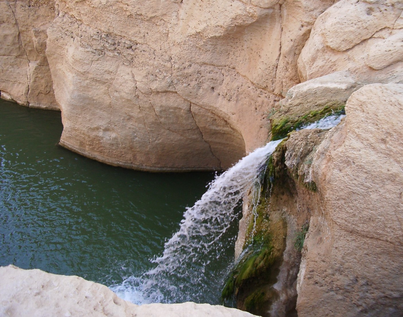 Chebika